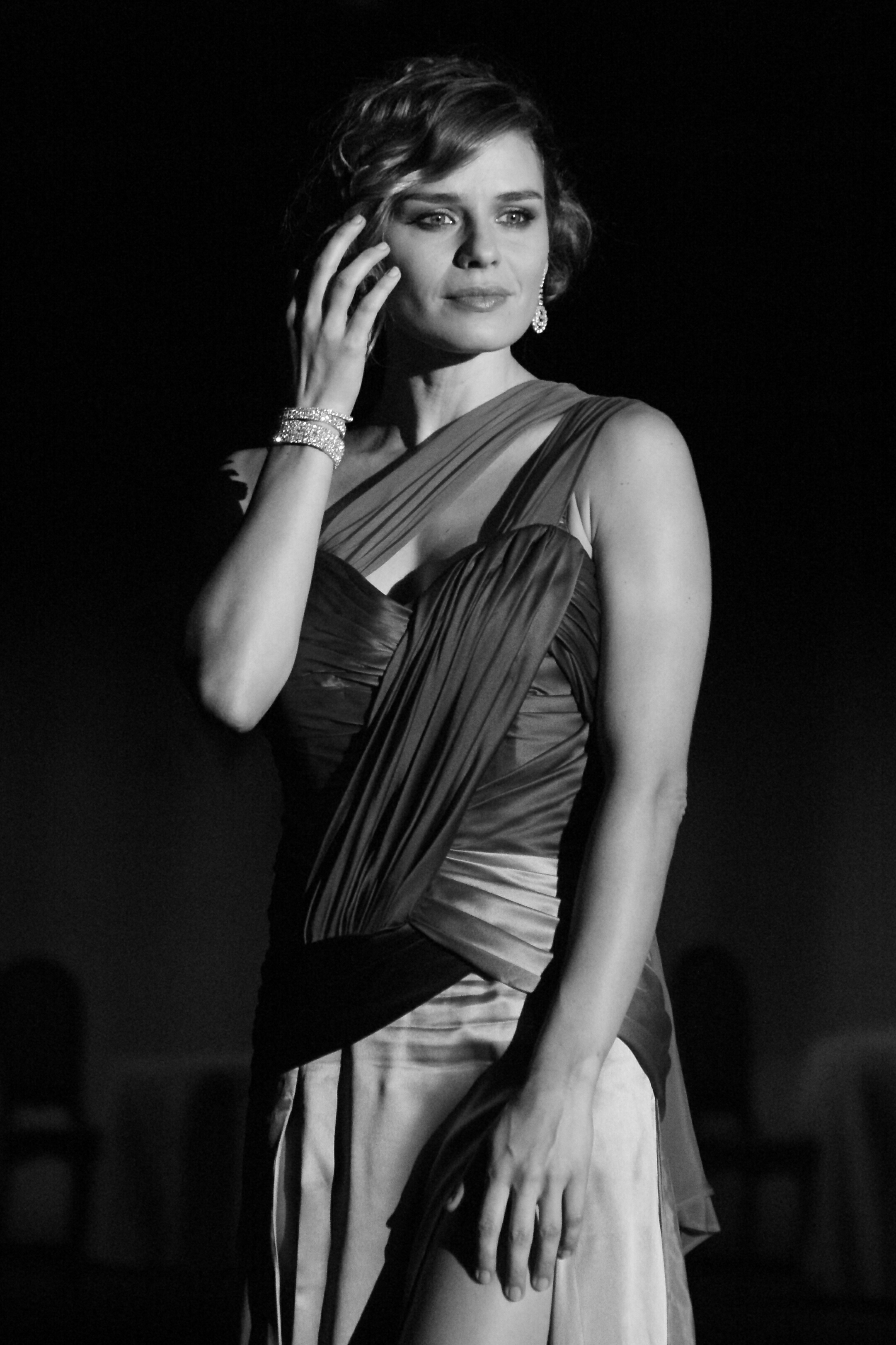 Natasza Urbańska.